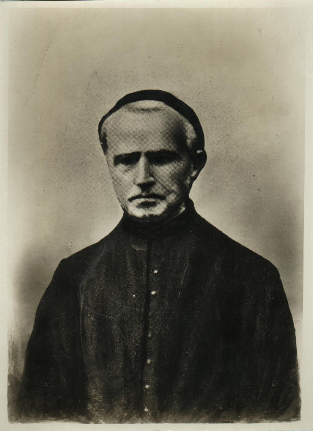 Francesco Pellico S.J. (1802-1884), presbitero italiano (stampa, 1850 circa)